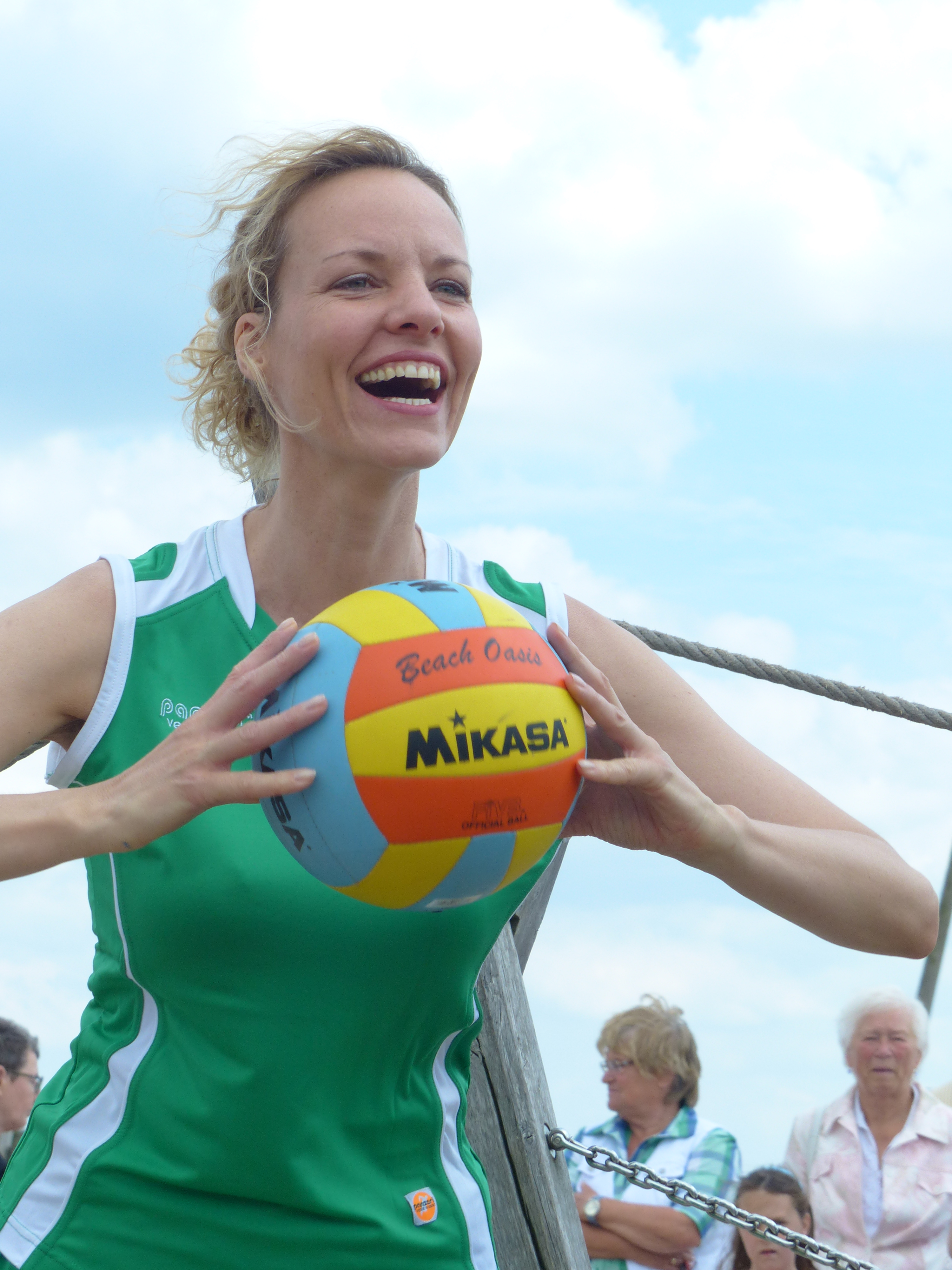 Melanie Wiegmann beim Fotoshooting, Beachvolleyball-Starcup 2013